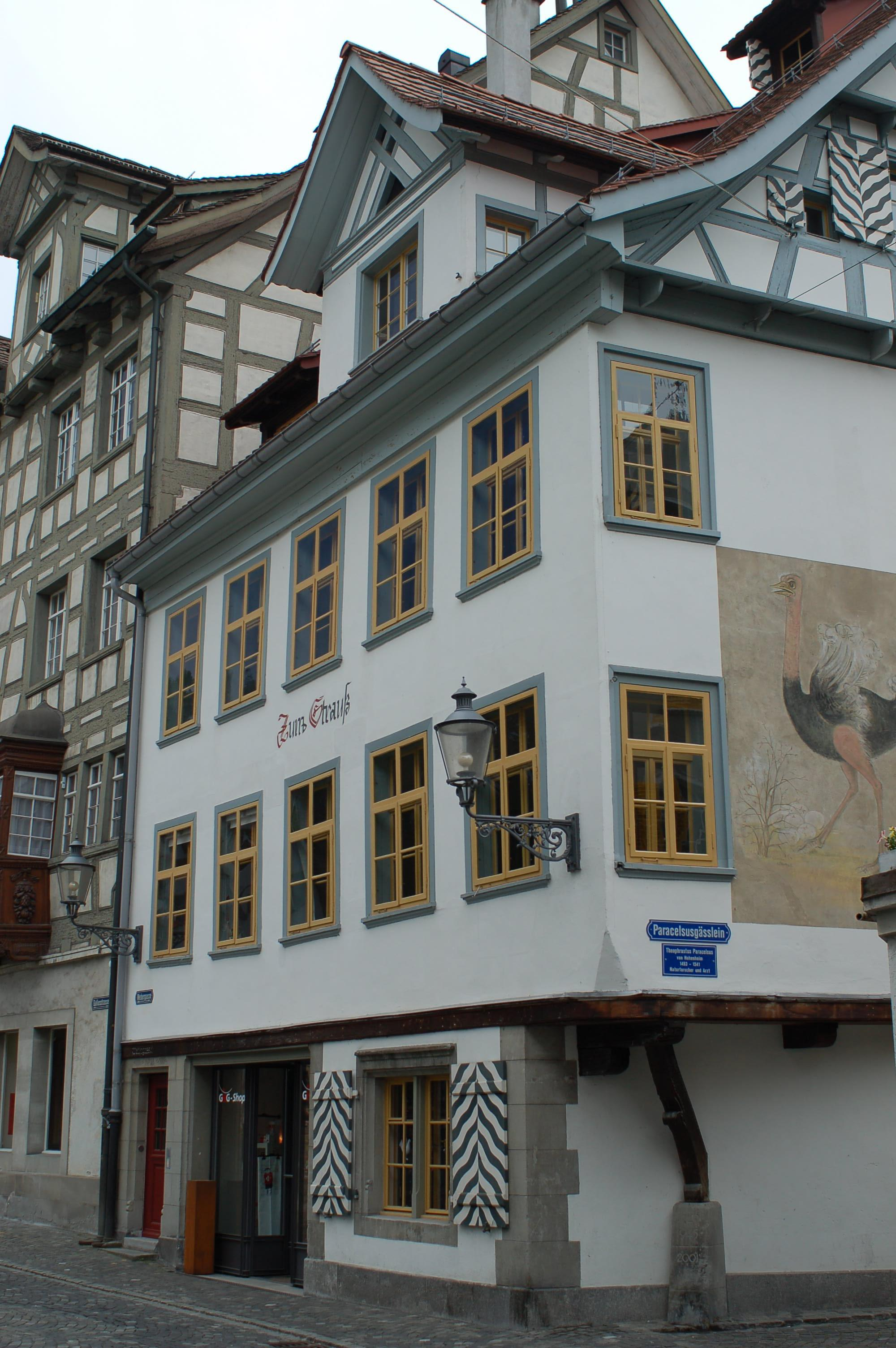 St. Gallen